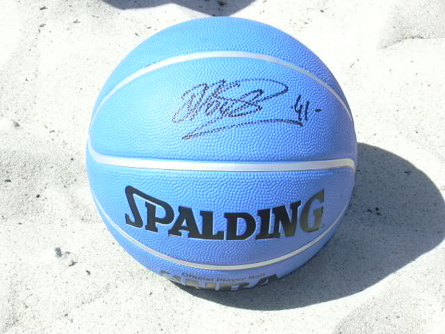 Basketball mit Autogramm von Dirk Nowitzki. Beachbasketball